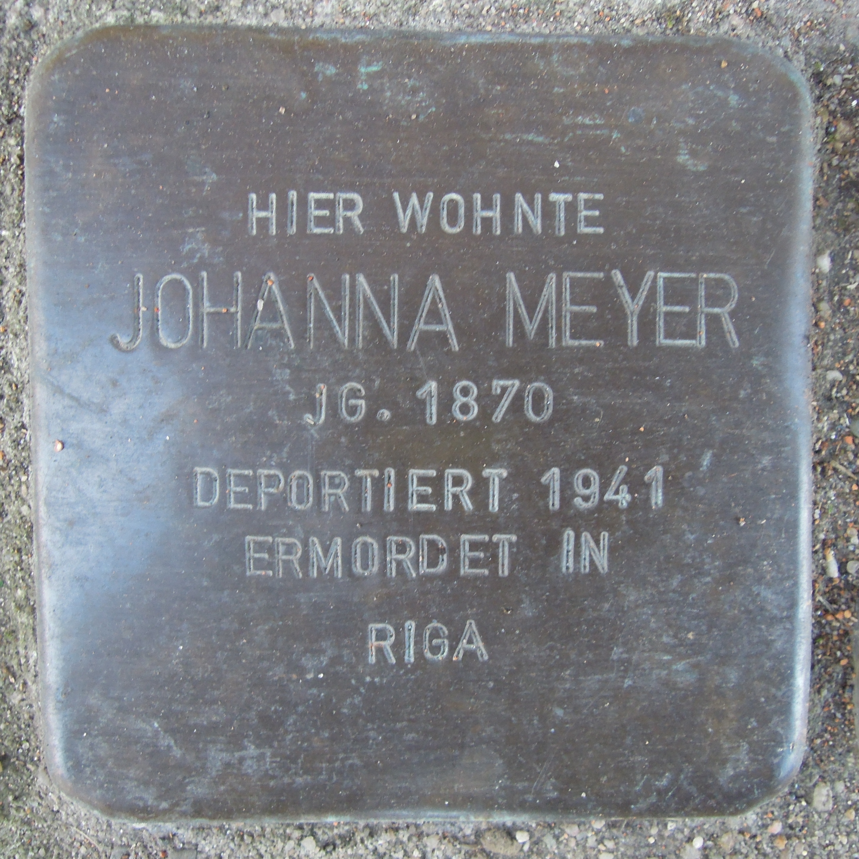 Stolperstein Alpen Bruckstraße 13 Johanna Meyer